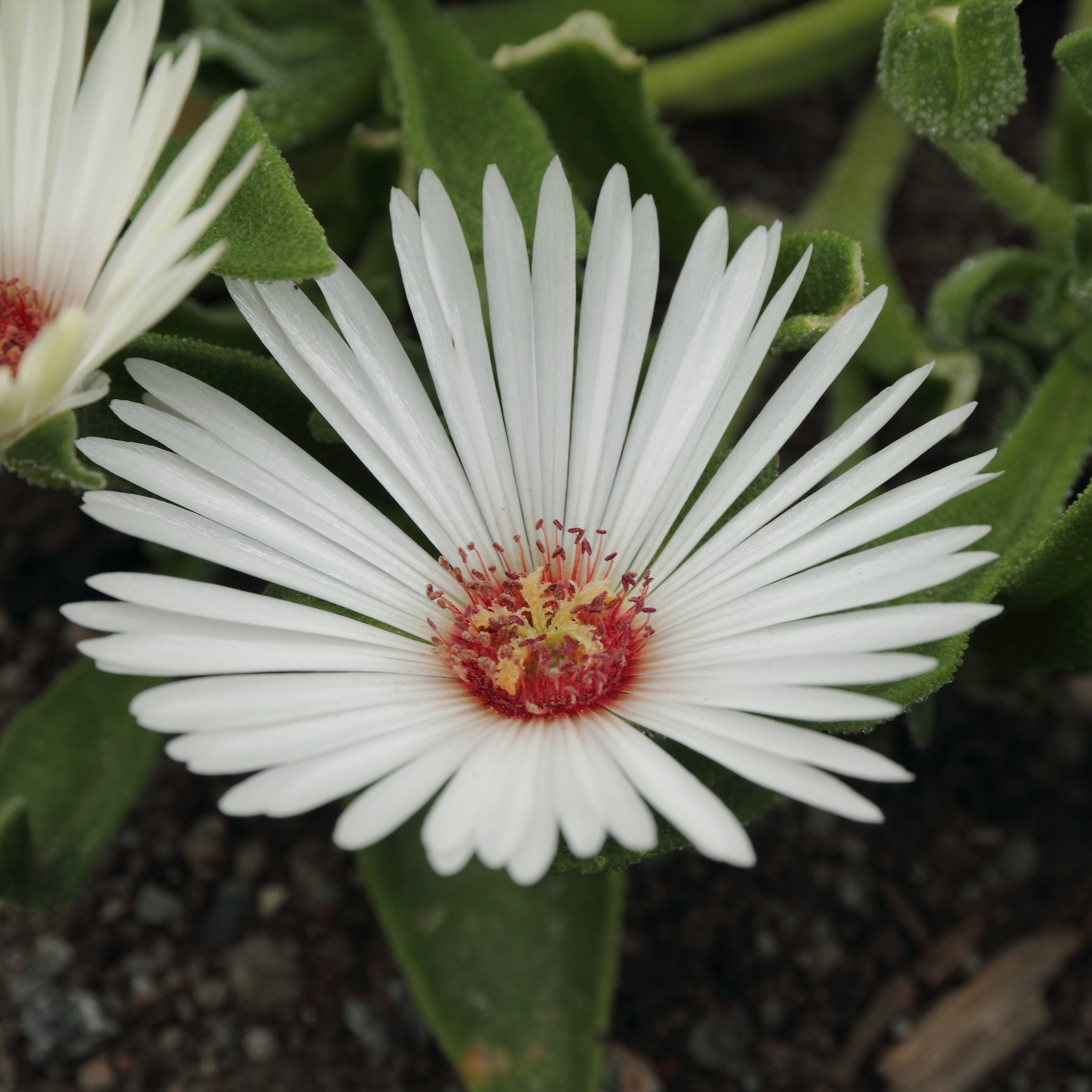 Dorotheanthus oculatus i Bergianska trädgården.